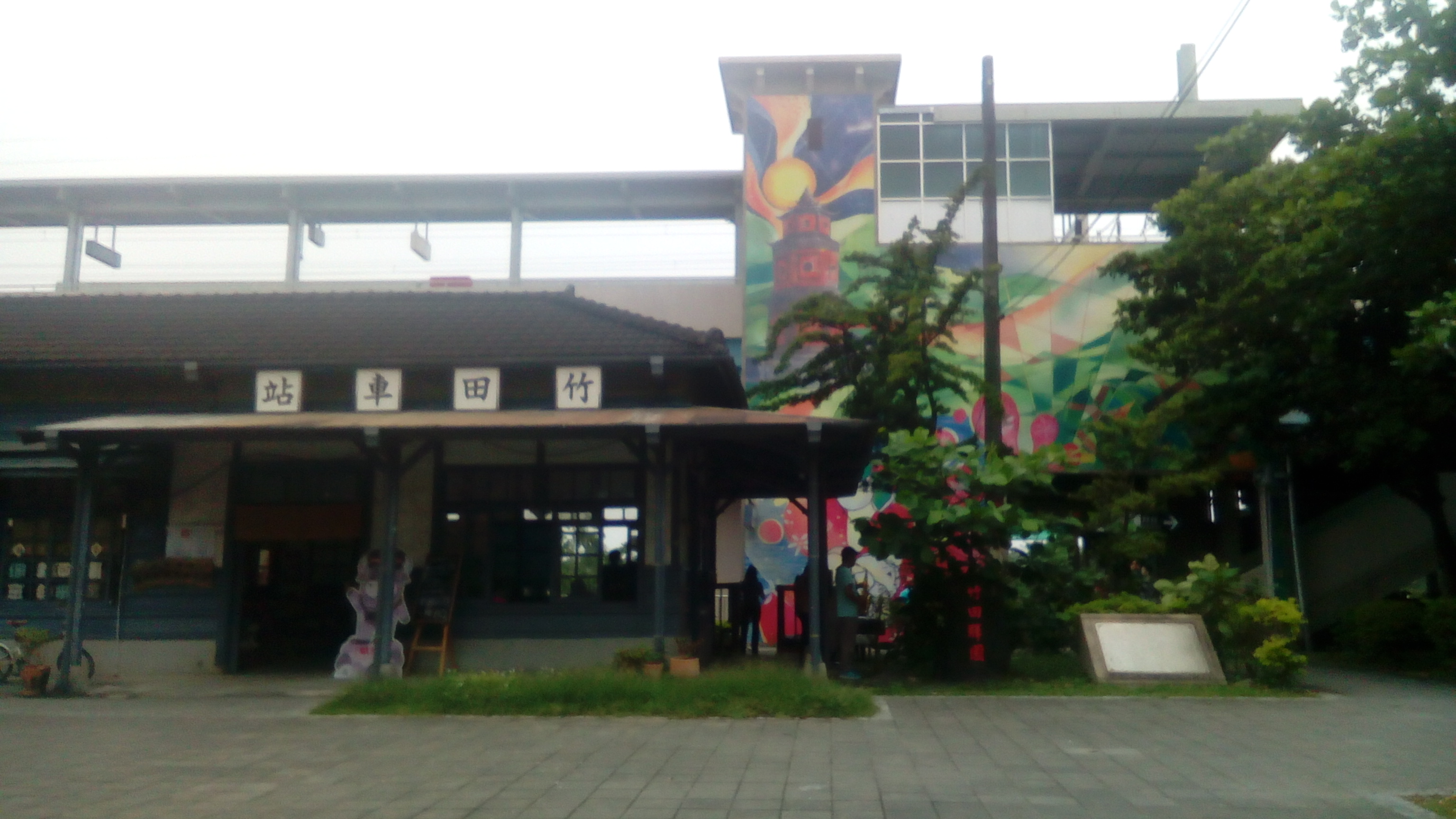 同上